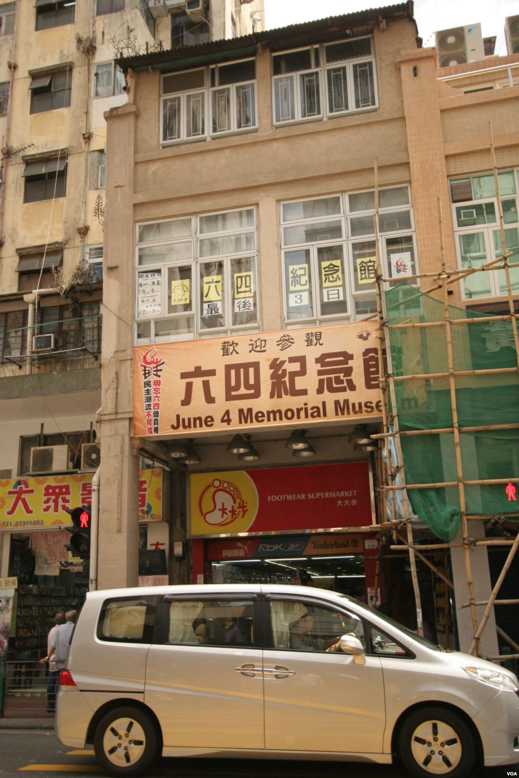 香港临时六四纪念馆位于深水埗的唐楼 (美国之音黎堡)